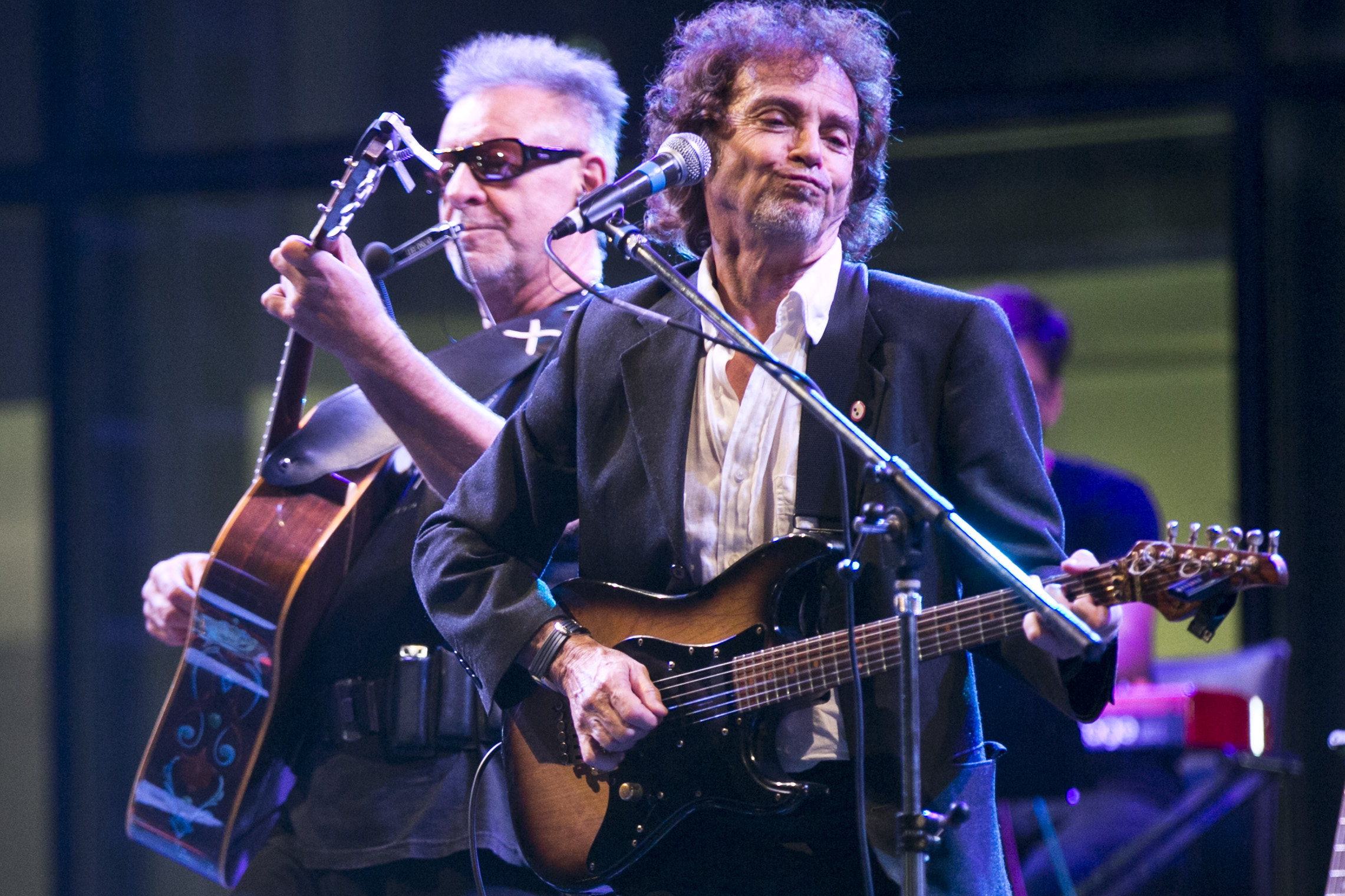 Buenos Aires, 2 de abril de 2015 – El Ministerio de Cultura de la Nación conmemoró el Día del Veterano y de los Caídos en la Guerra de Malvinas con el encuentro "Arte por la Paz" en el Museo Malvinas e Islas del Atlántico Sur, con las actuaciones de Raúl Porchetto, León Gieco, Fabiana Cantilo y más invitados. Fotos: Mauro Rico/ Ministerio de Cultura de la Nación